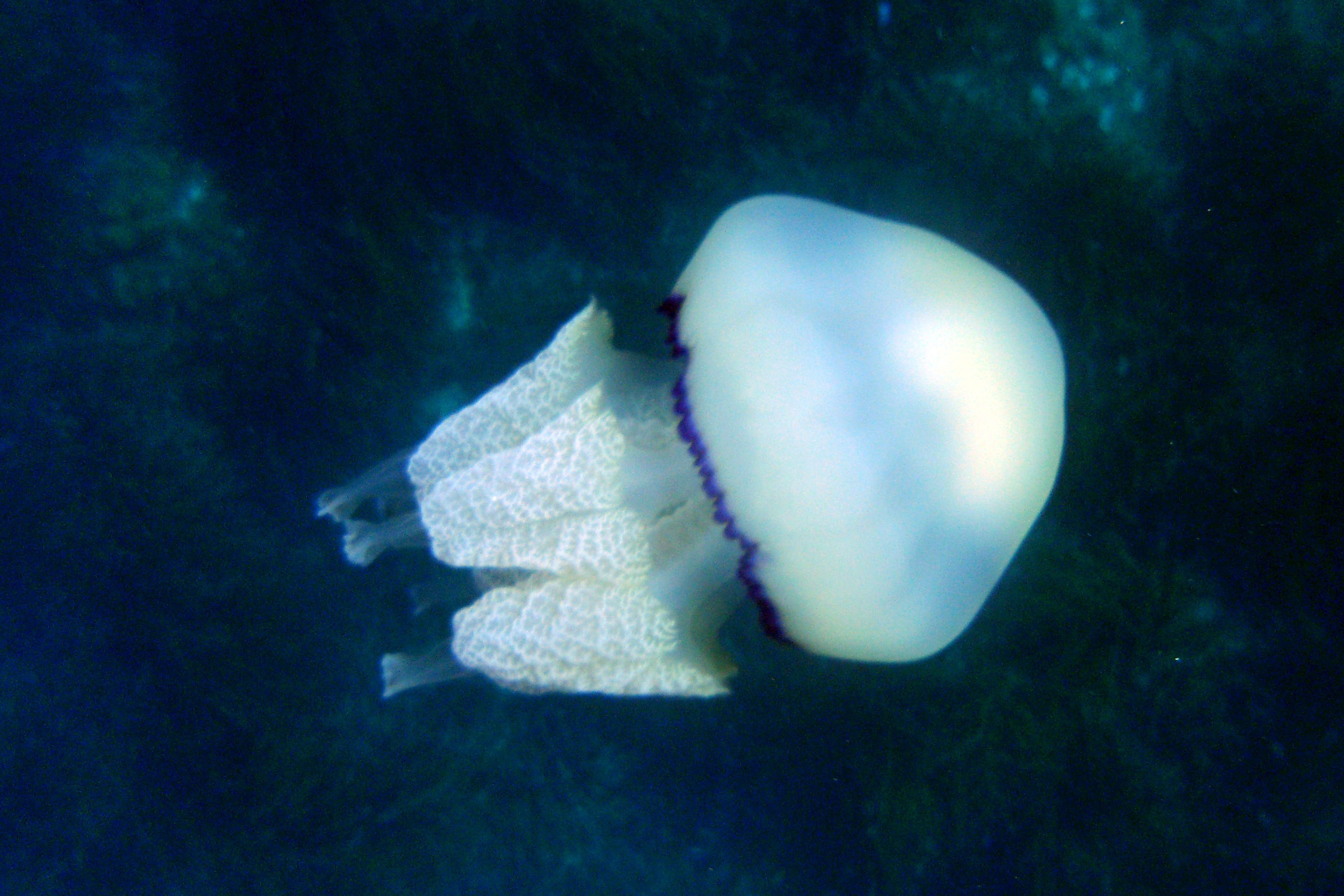 Rhizostoma pulmo Favignana, Sicily